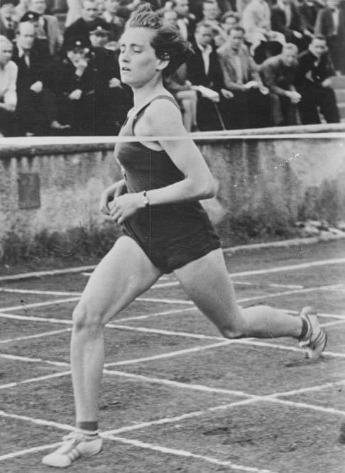 Christa Seliger Zentralbild St-Ku 14.6.1954 1156.A.-V. 14.6.1954 Beim ersten Durchgang zur Deutschen Mannschaftsmeisterschaft der Leichtathleten im Thälmann-Stadion in Potsdam lief Christa Seliger am 12.6.1954 die 100-Meter-Strecke in 12,4 Sekunden.